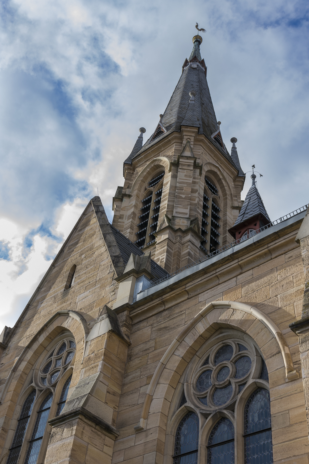 Stadtkirche zu Wanfried